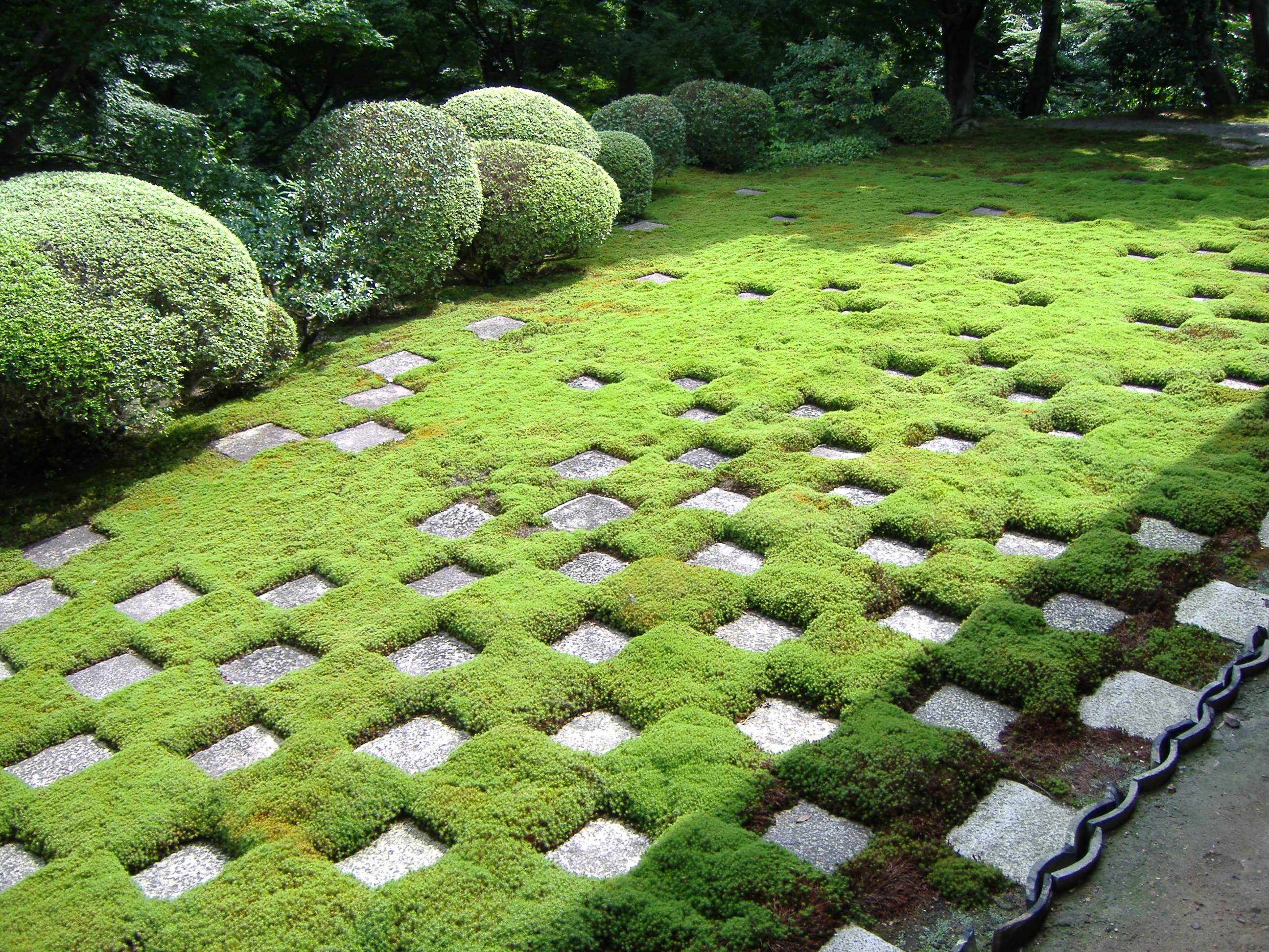 West garden at Tōfuku-ji, Kyōto, Japan